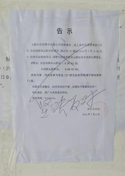 中文（中国大陆）: 上海公交127路缩线通告